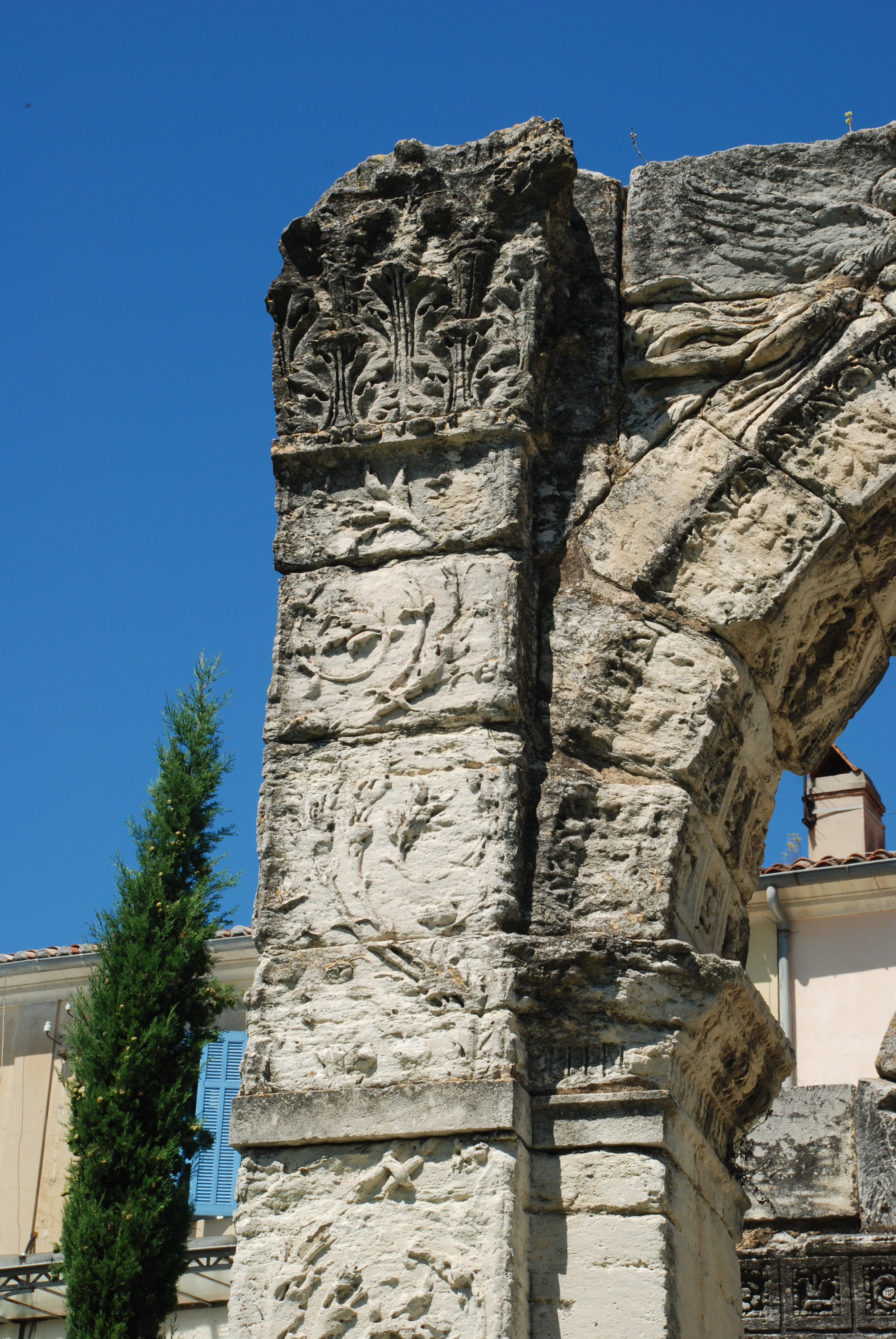 France - Provence - Arc romain de Cavaillon